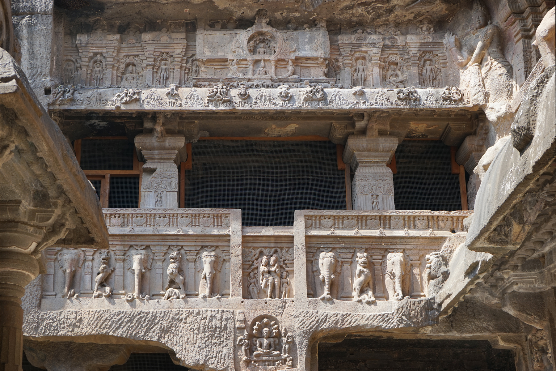 Ellora Caves, Jainism